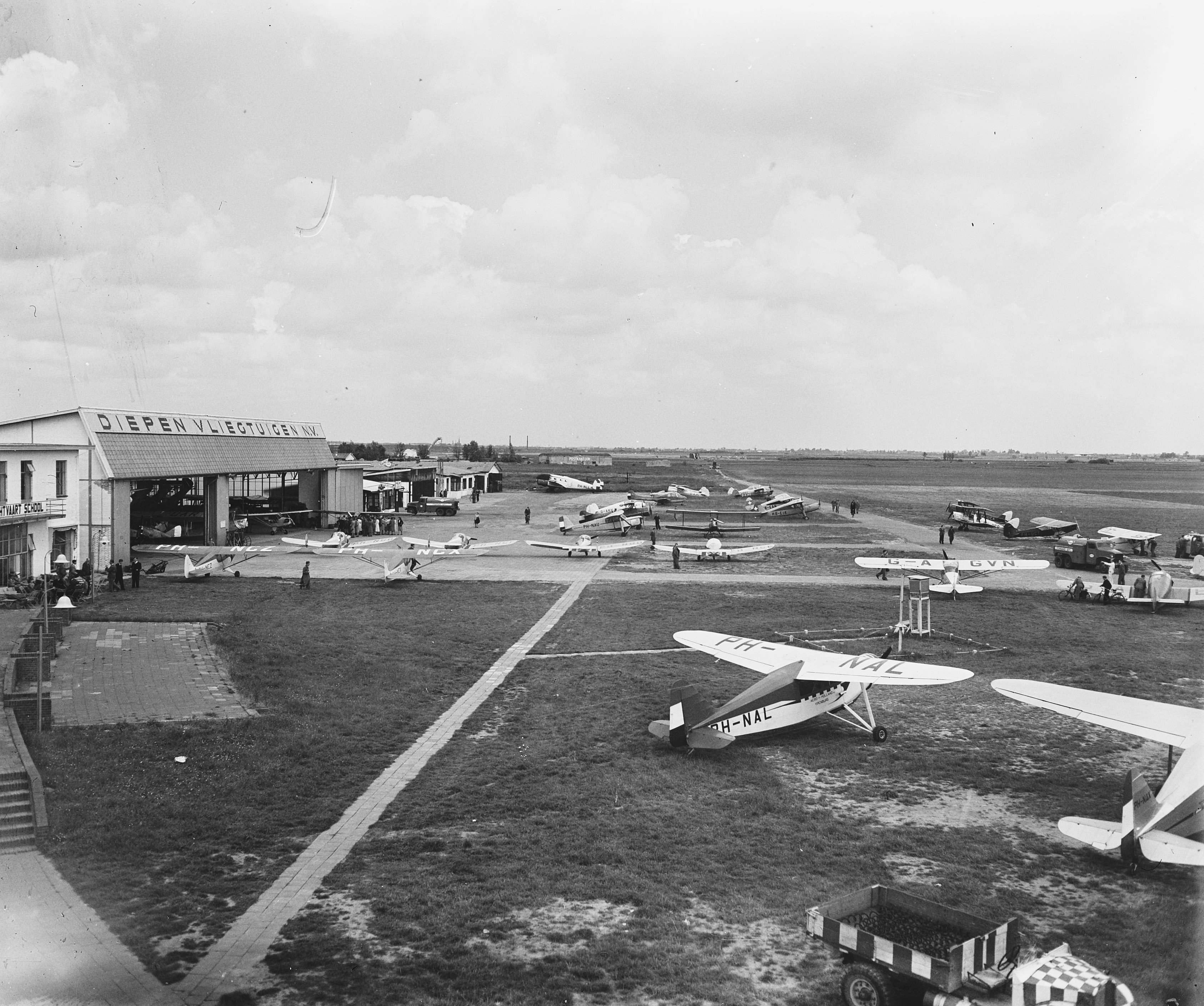 Collectie / Archief : Fotocollectie Anefo Reportage / Serie : [ onbekend ] Beschrijving : Ralley voor sportvliegers Ypenburg. Overzicht Datum : 30 mei 1948 Locatie : Den Haag, Ypenburg, Zuid-Holland Trefwoorden : Ralley, overzichten, sportvliegers Fotograaf : Snikkers, […] / Anefo Auteursrechthebbende : Nationaal Archief Materiaalsoort : Glasnegatief Nummer archiefinventaris : bekijk toegang 2.24.01.09 Bestanddeelnummer : 902-7732